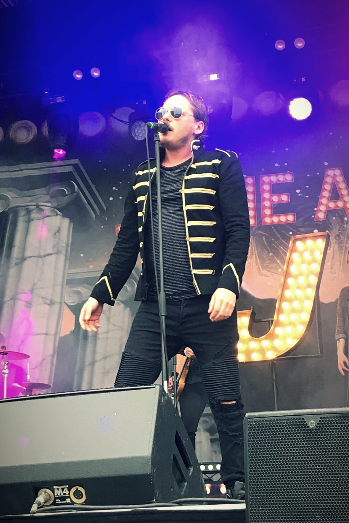 Jonne Aaron esiintymässä Kotka Soi -tapahtumassa 14. kesäkuuta 2019.